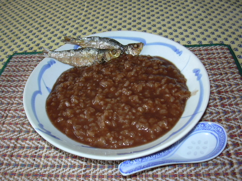 Tagalog: Tsampurado at hawot